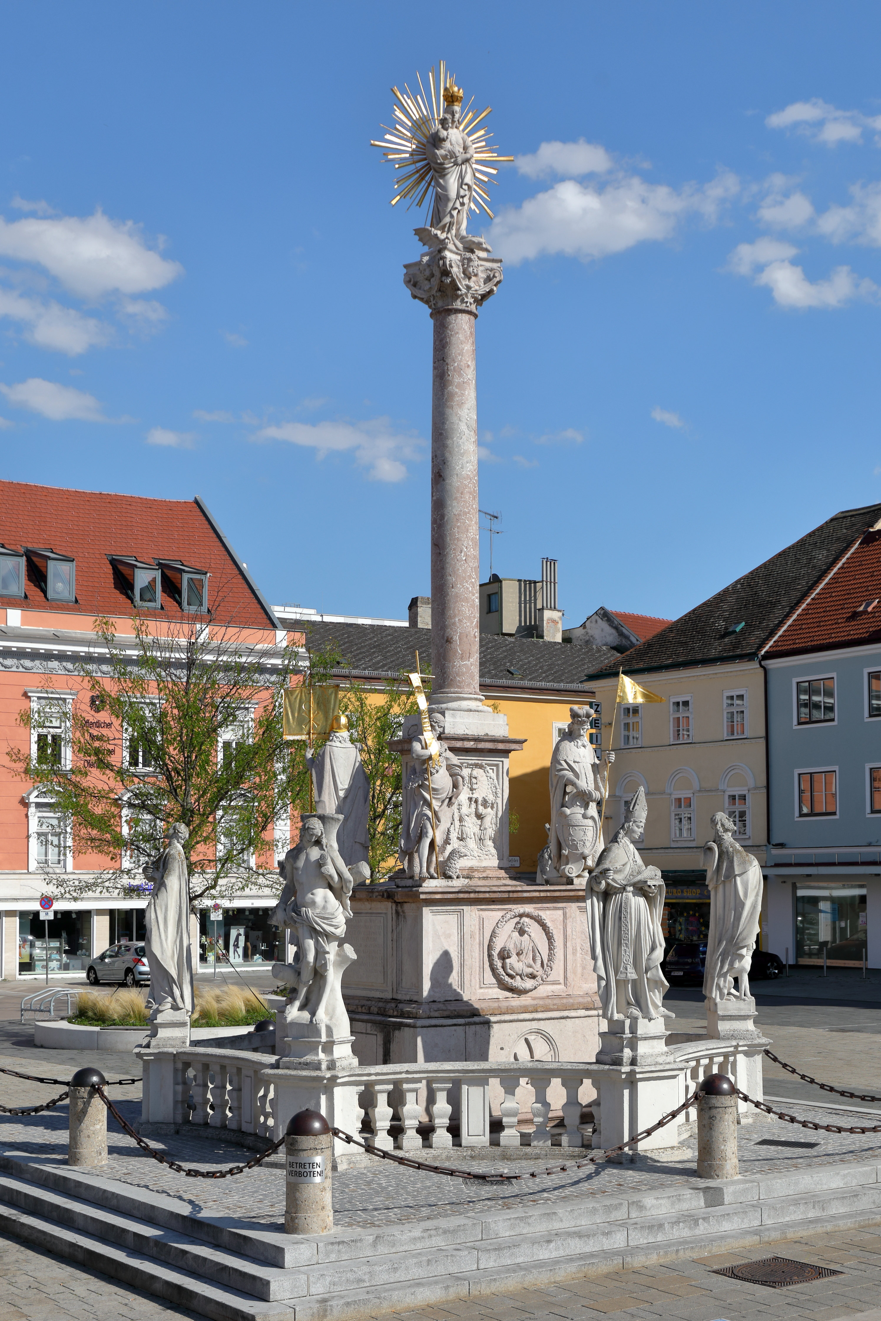 Nordwestansicht der Mariensäule am Hauptplatz der niederösterreichischen Bezirkshauptstadt Wiener Neustadt.Die Mariensäule wurde vom Wiener Neustädter Bischofs Leopold Graf Kollonitsch gestiftet. Sie soll an die Hochzeiten zweier Schwestern Kaiser Leopolds I. 1678 in der St. Georgs-Kirche der Wiener Neustädter Burg erinnern. Die sechseckige Balustrade mit überlebensgroßen Statuen wurde 1714 von Bischof Franz Anton Graf von Puchheim gestiftet. Auf dem Sockel sind die 4 Heiligen Johannes d. Täufer, Florian, Antonius von Padua und Leopold dargestellt und bei der Balustrade die 6 Pestheiligen Sebastian, Franz Xaver, Karl Borromäus, Rosalia, Rochus und Benno.